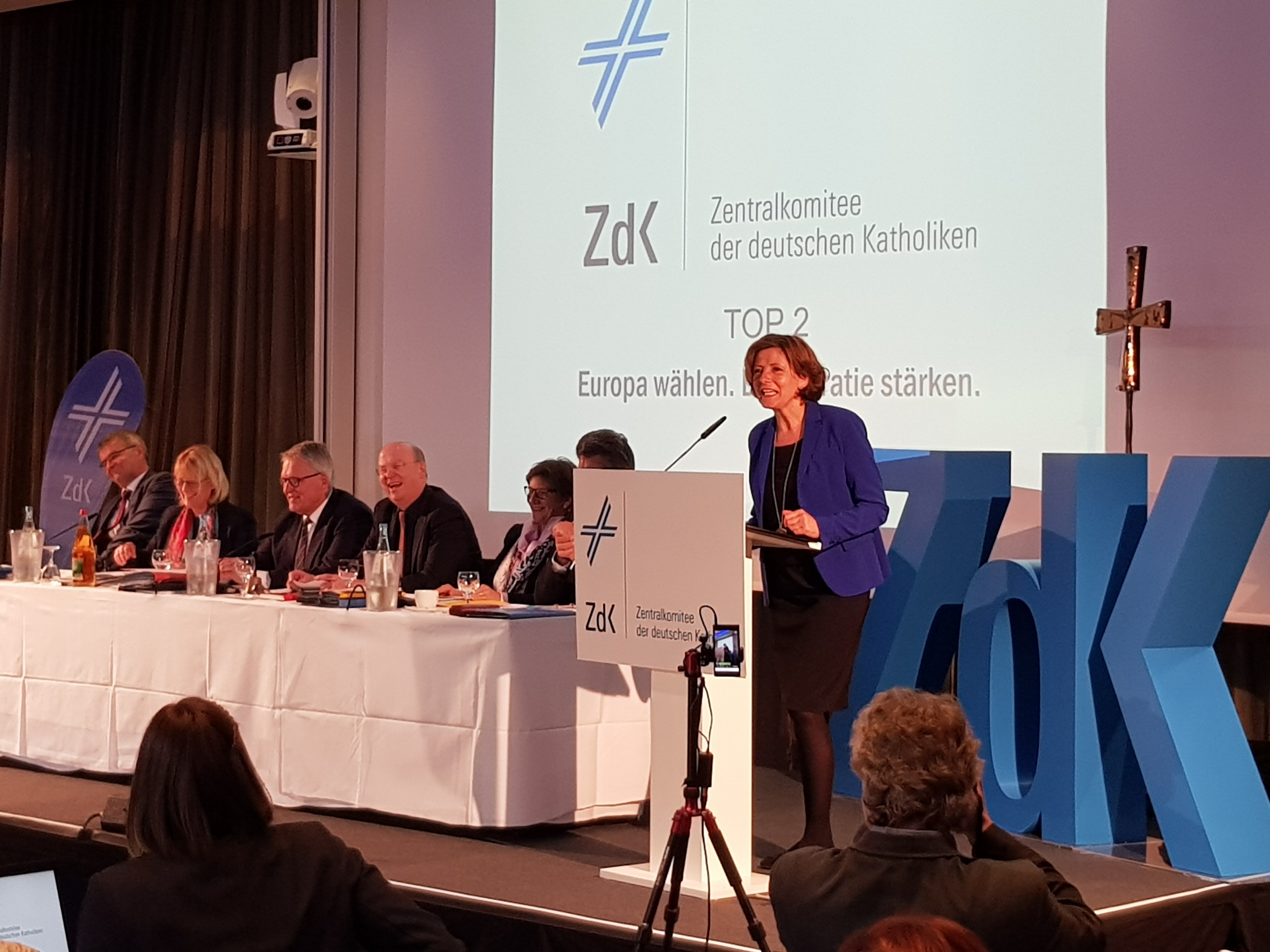 ZdK-Vollversammlung